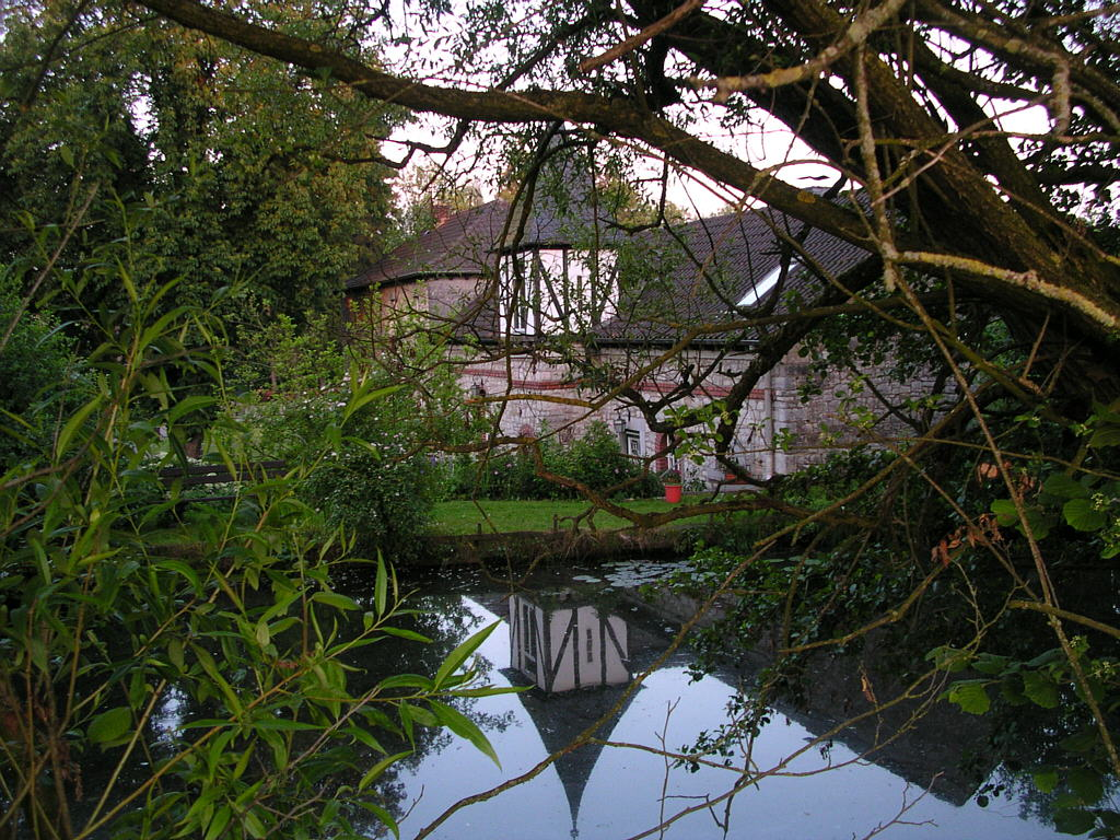 Aachen, Eisenhütte Marienthal in Sief, vermutlich 1760 errichtet, 1830 Lohnweberei, 1913 Filztuchfabrik Bossbach